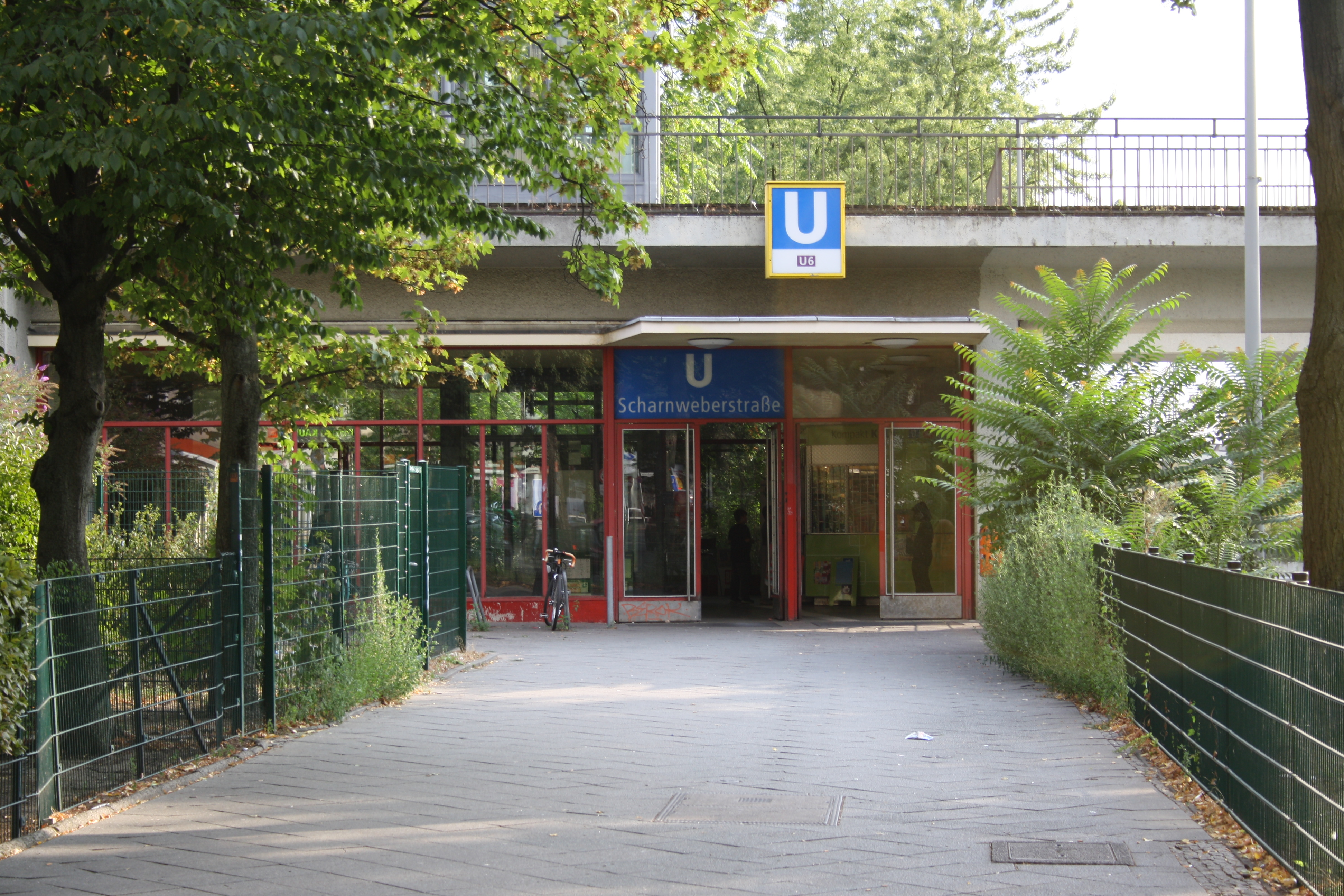 U-Bhf. Scharnweberstraße Berlin